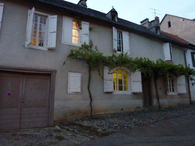 Maison de Clément Bressou à Castillon-en-Couserans (Ariège), aujourd'hui propriété de son fils Marc Bressou.